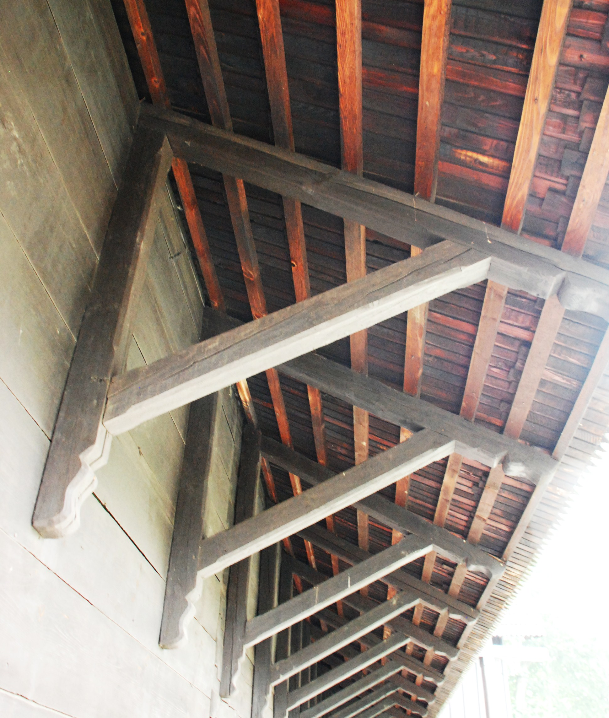 Daszek okapowy w kościele pw. św. Katarzyny w Pielgrzymowicach